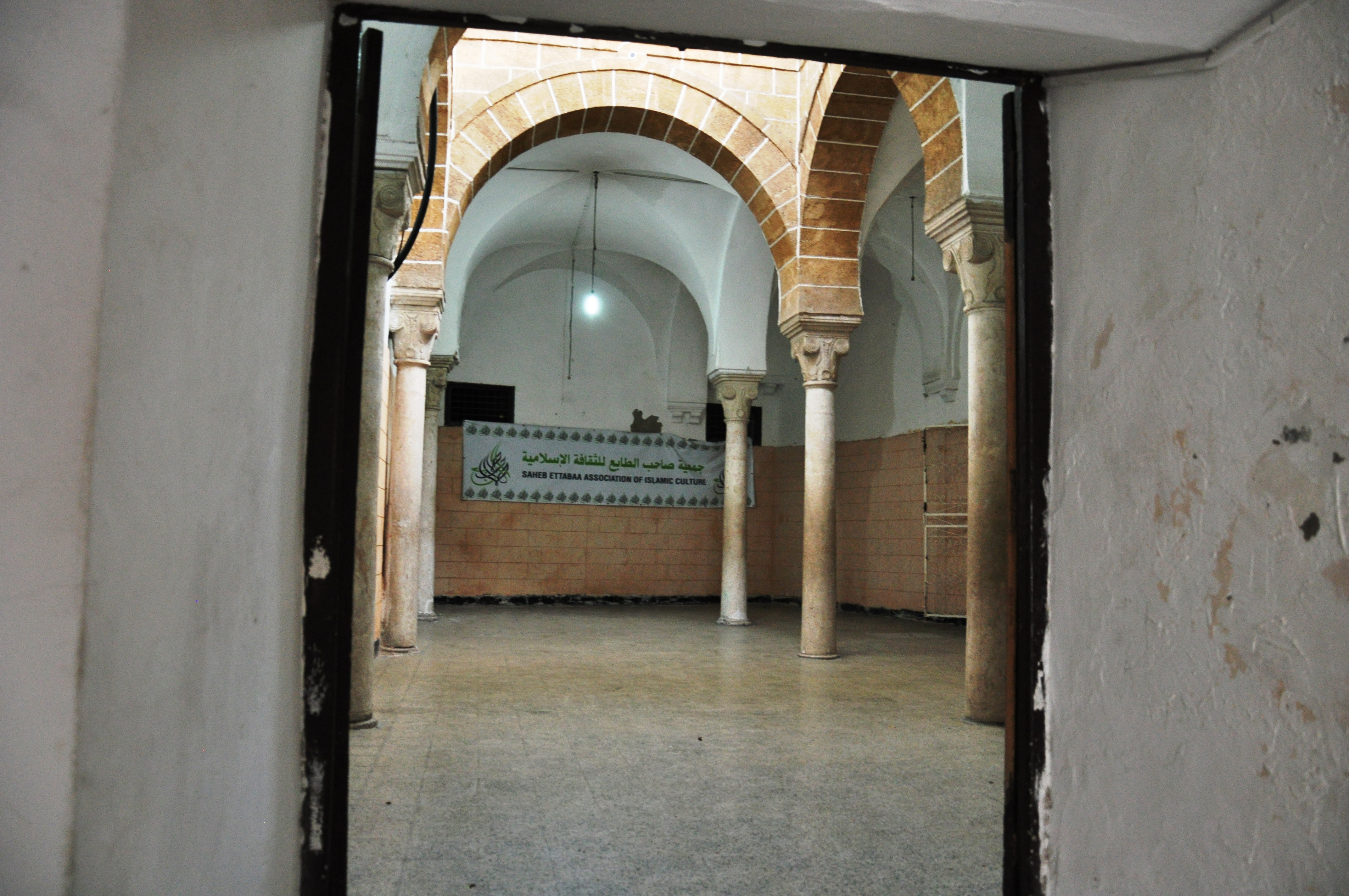 Mederça de la mosquée Sahêb-et-Taba